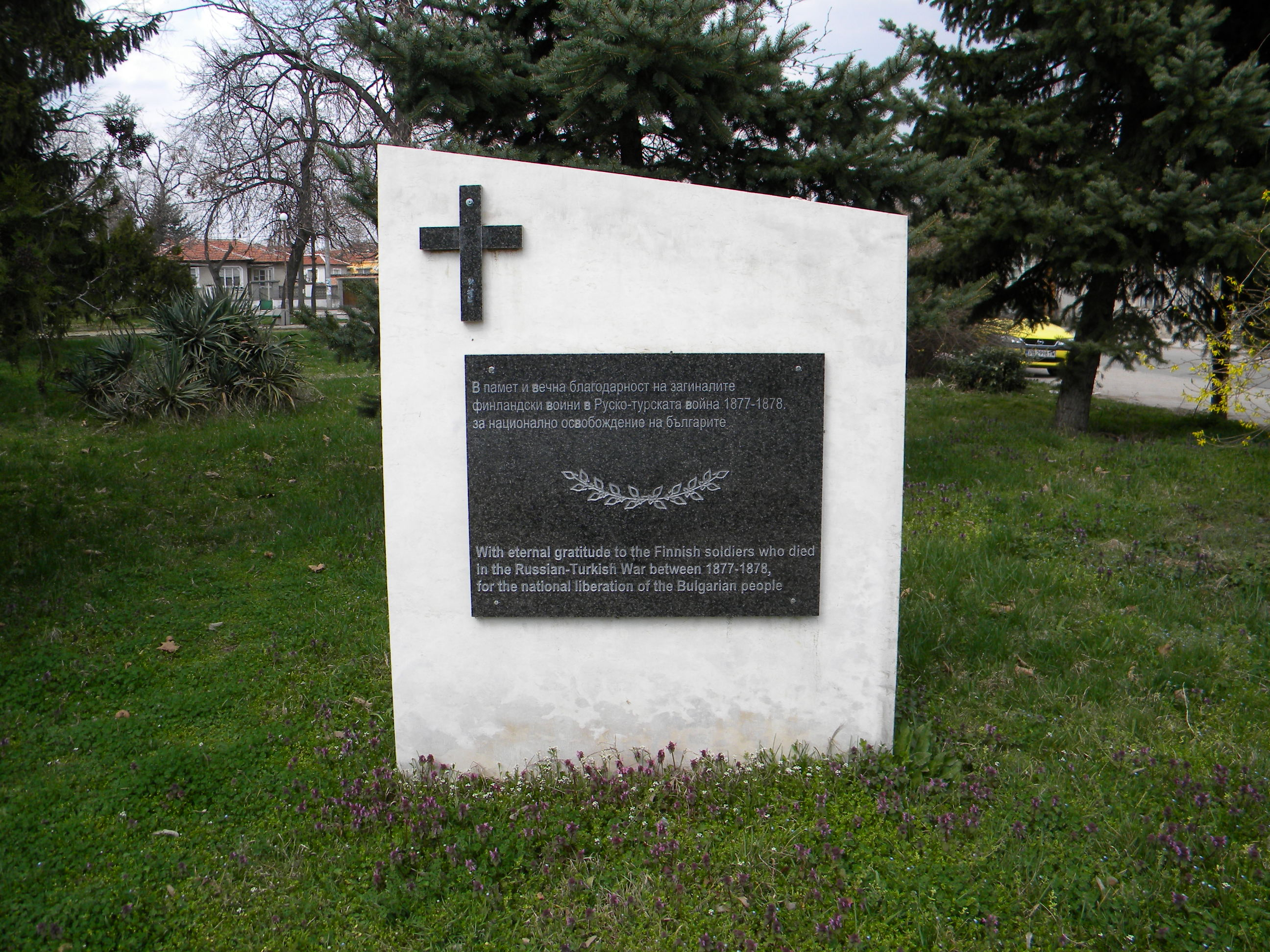 Паметник от руско-турската война